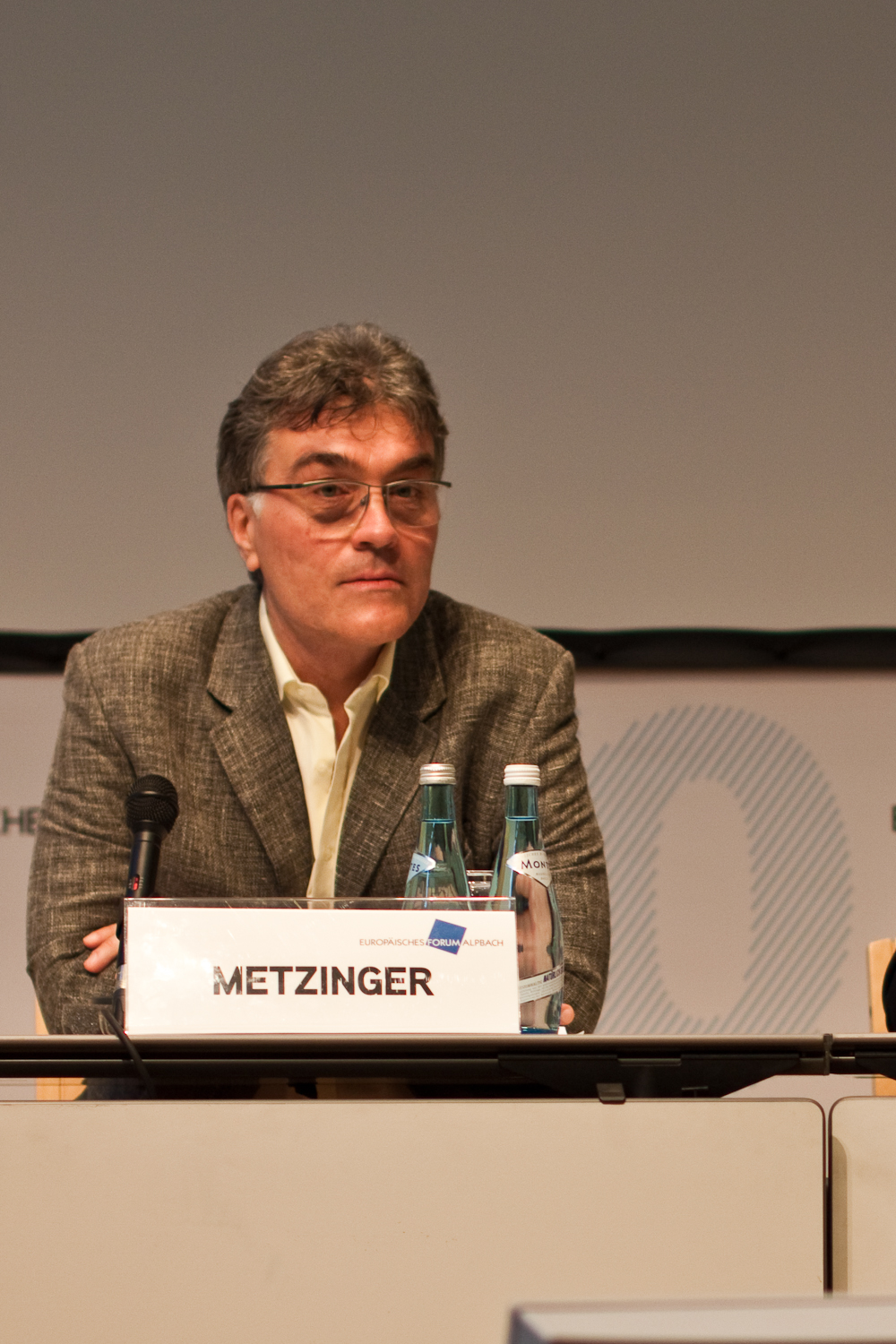 Thomas Metzinger am Forum Alpbach